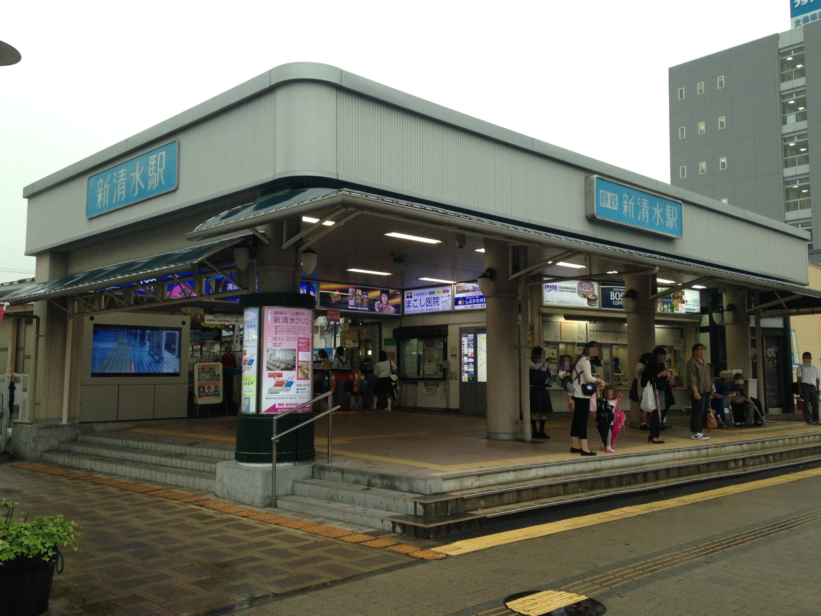 新清水駅の駅舎